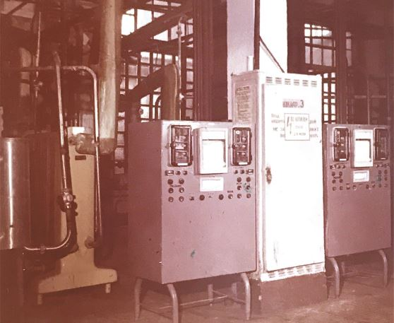 Аппаратный комплекс управления